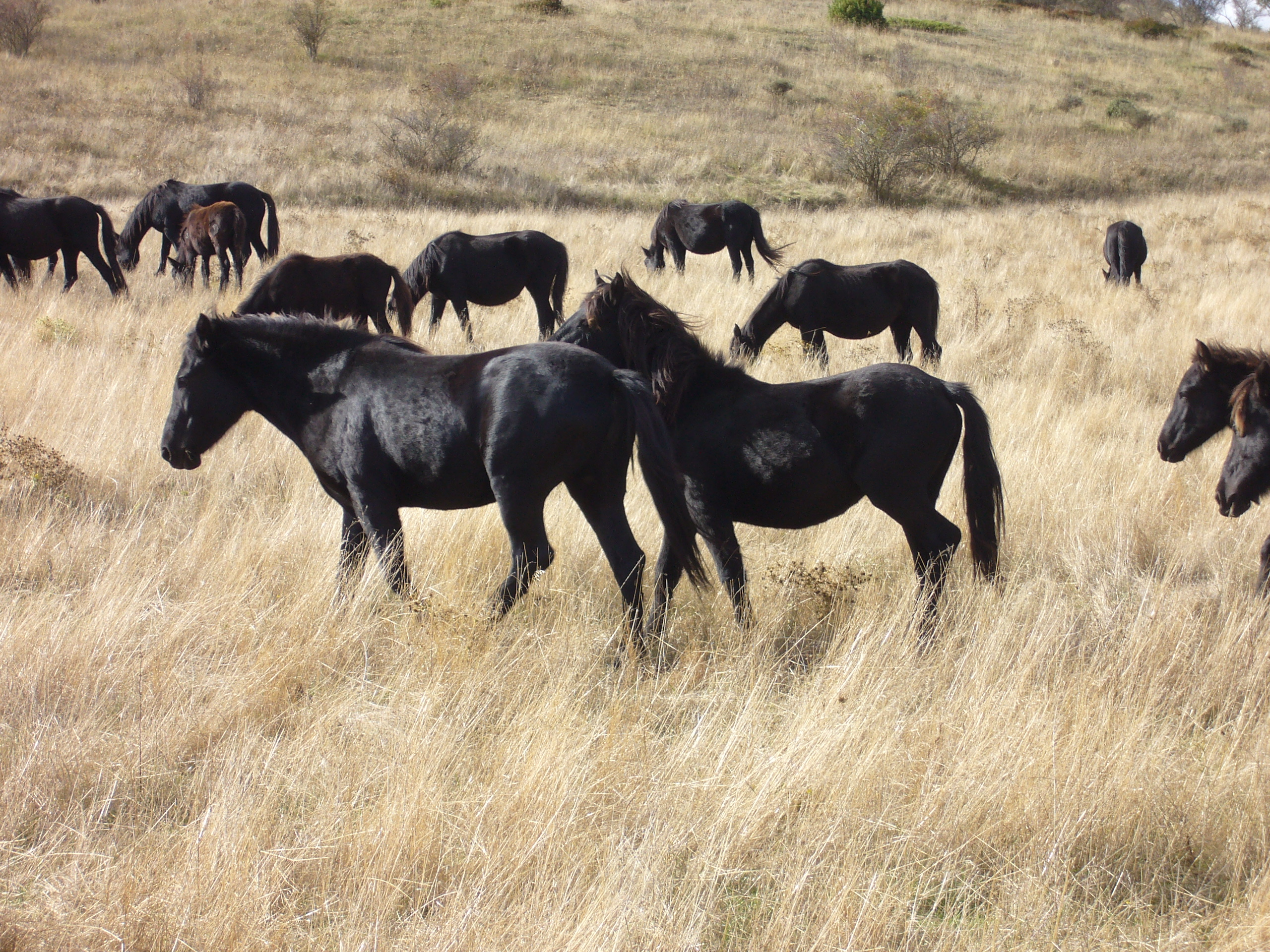 Zaldiak Pancorbon